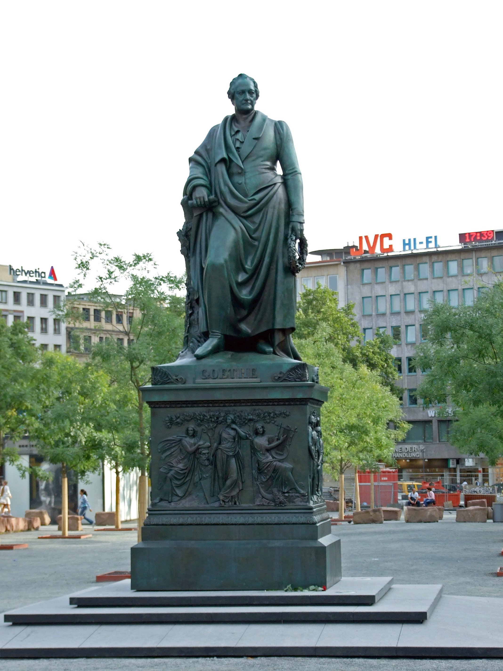 Goethe-Denkmal von Ludwig Michael Schwanthaler, nach seiner Restaurierung und Enthüllung (2007) auf dem Goetheplatz in Frankfurt